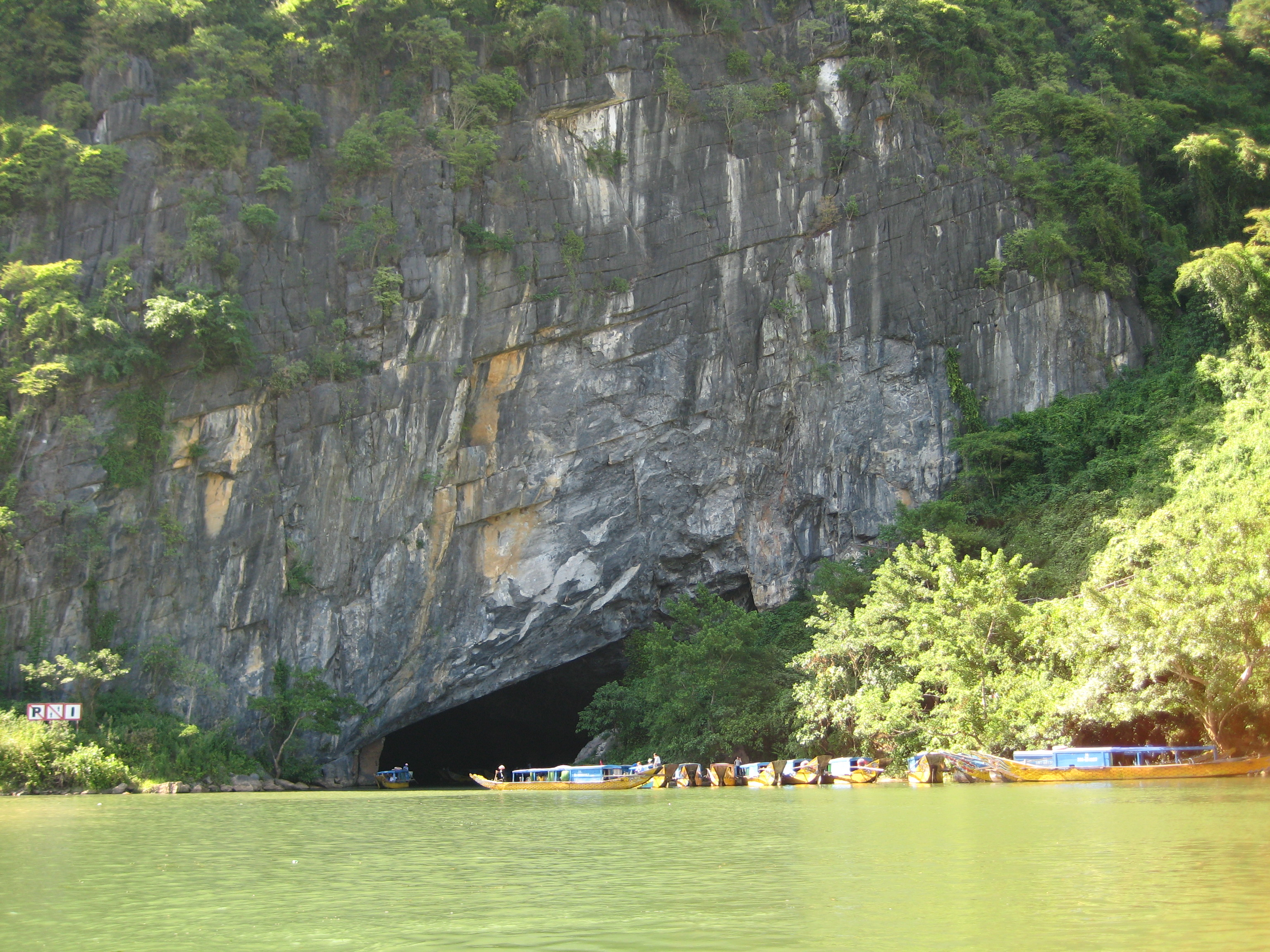 Phong Nha Ke Bang National Park, Central Vietnam